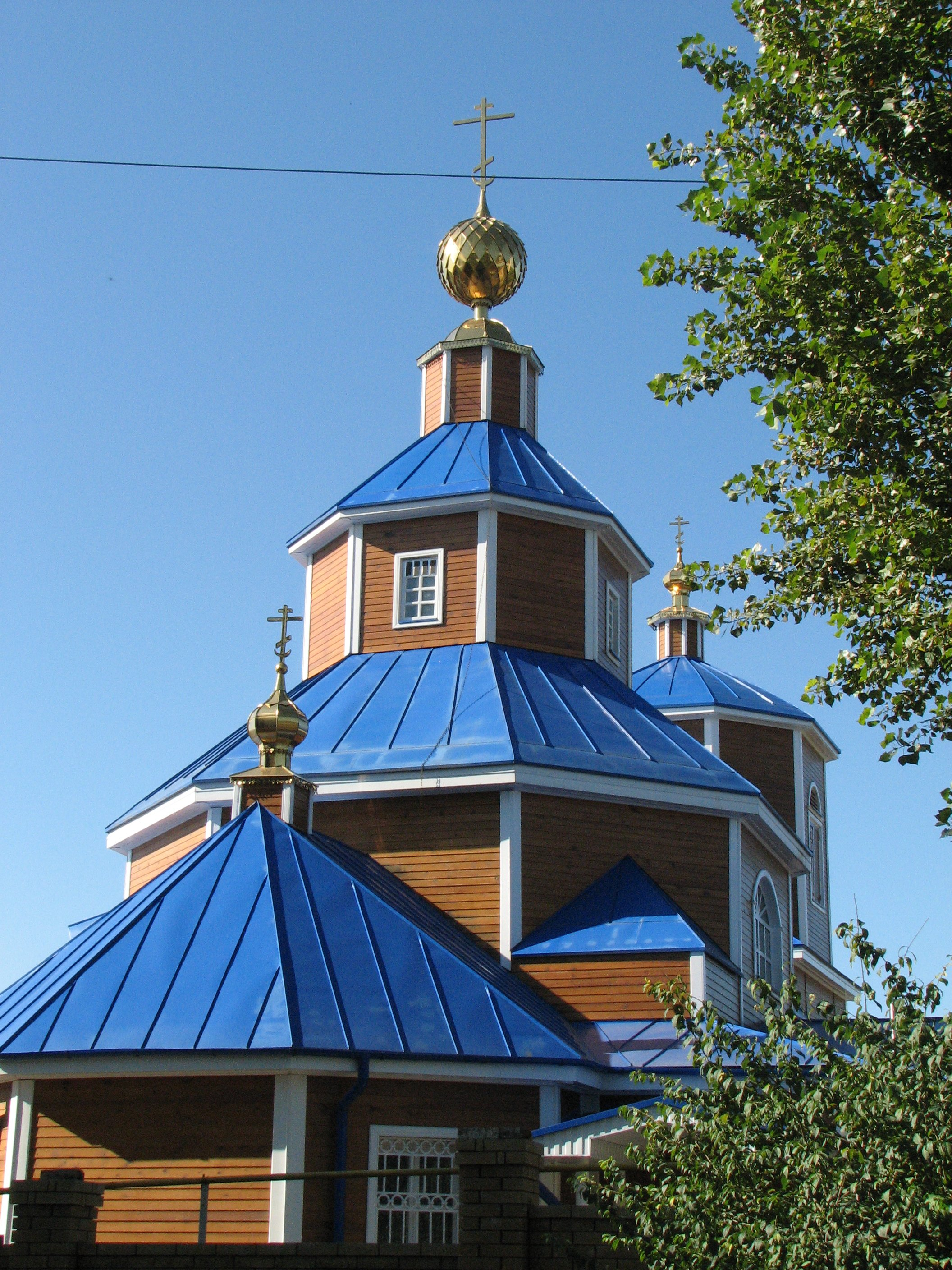 Церковь святителя Николая в Георгиевской крепости (деревянная): улица Красноармейская, 17, Георгиевск, Ставропольский край